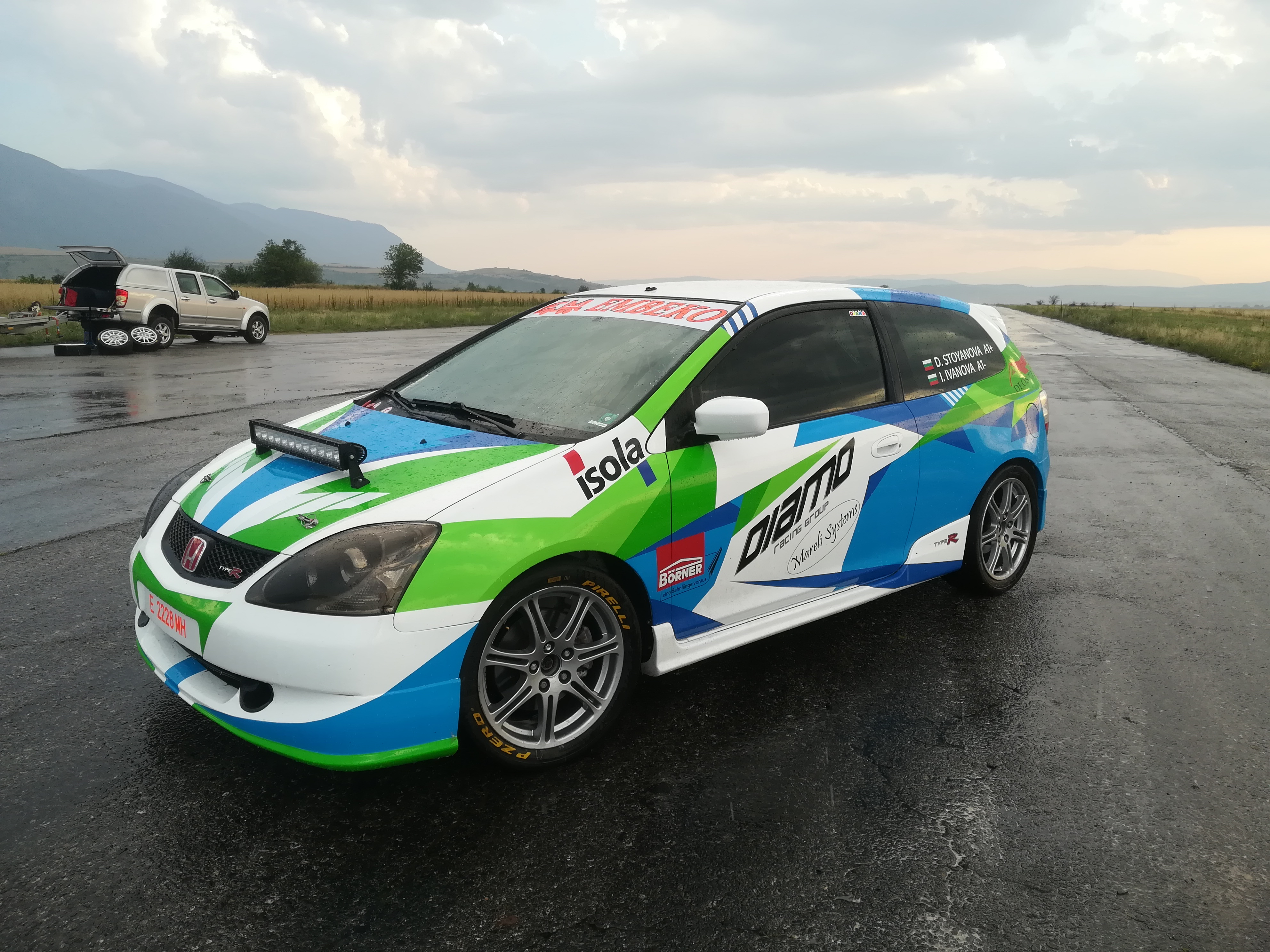 Първи тест на новия автомобил Honda Civic Type-R вече в ръцете на дамския екипаж Стоянова/Иванова